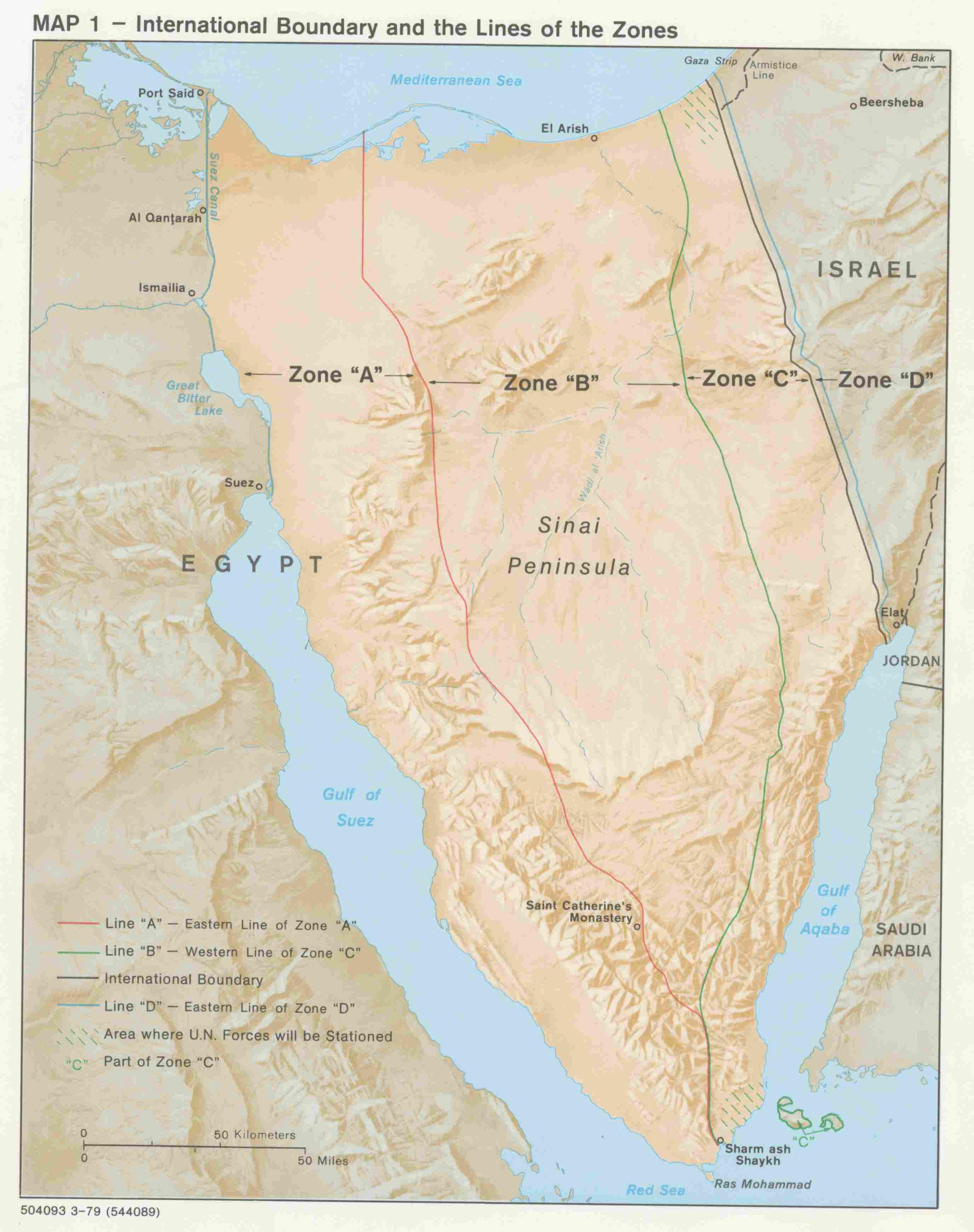 1979 Sinai zones